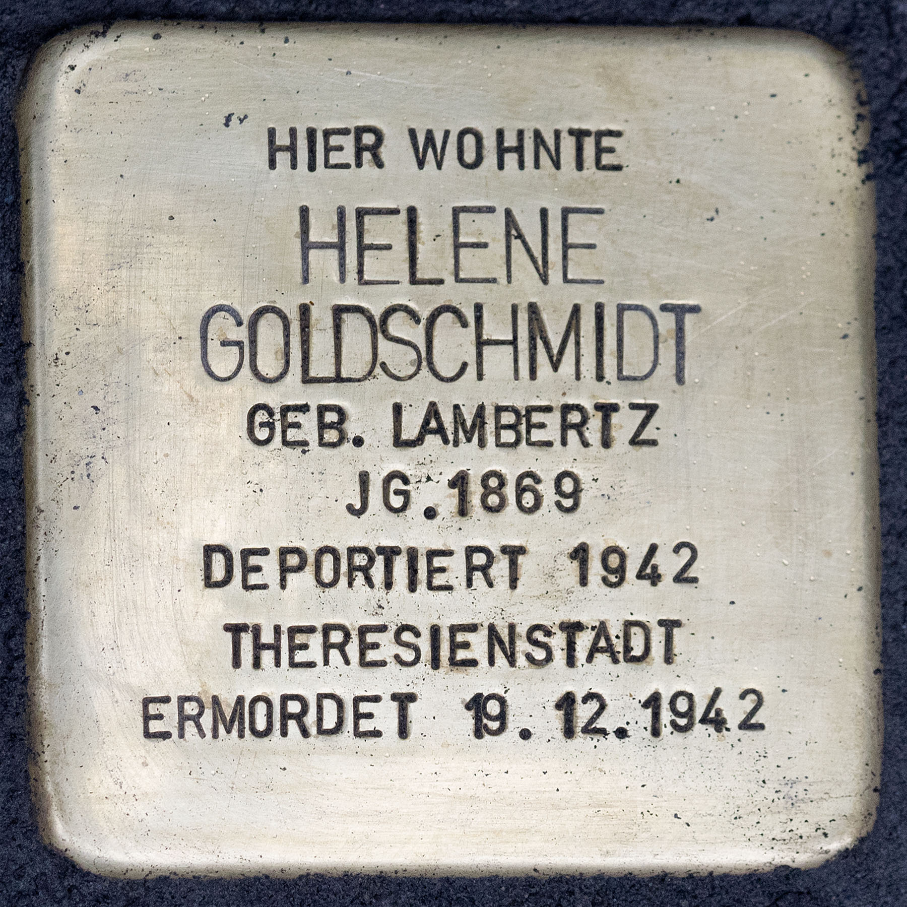 Stolpersteine Kempen: Helene Goldschmidt